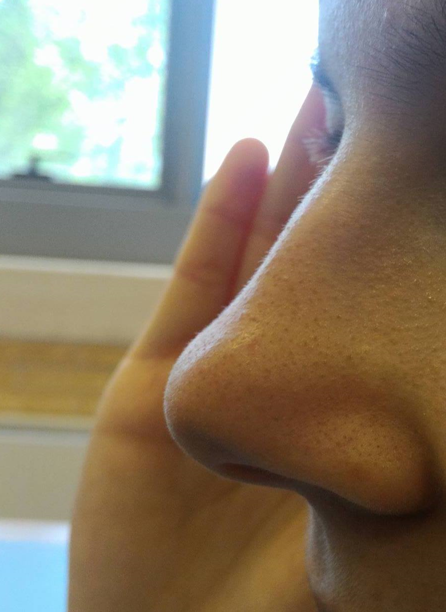 Il Naso rincagnato di una giovane donna di 22 anni